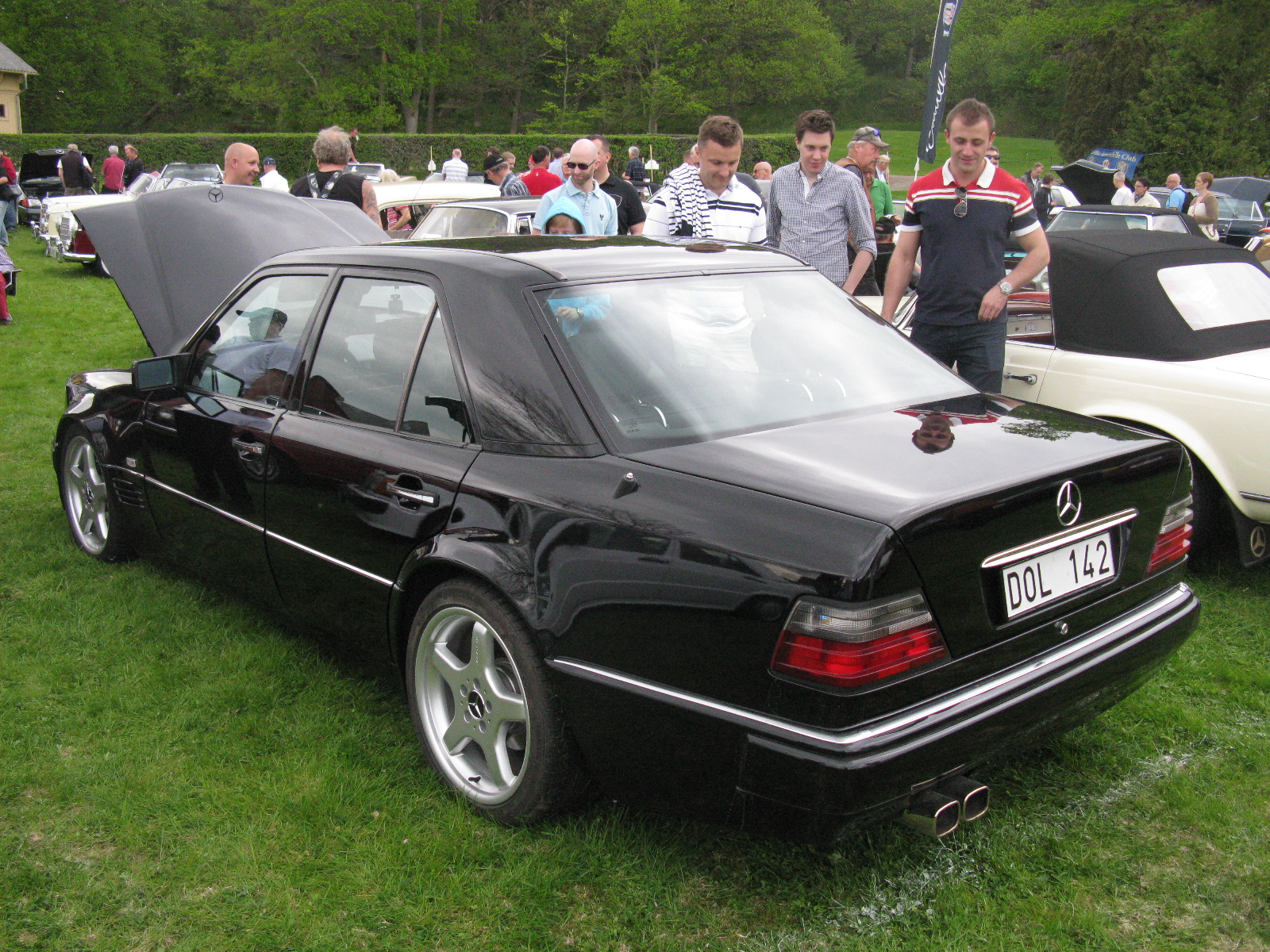 Mercedes-Benz 500E W124